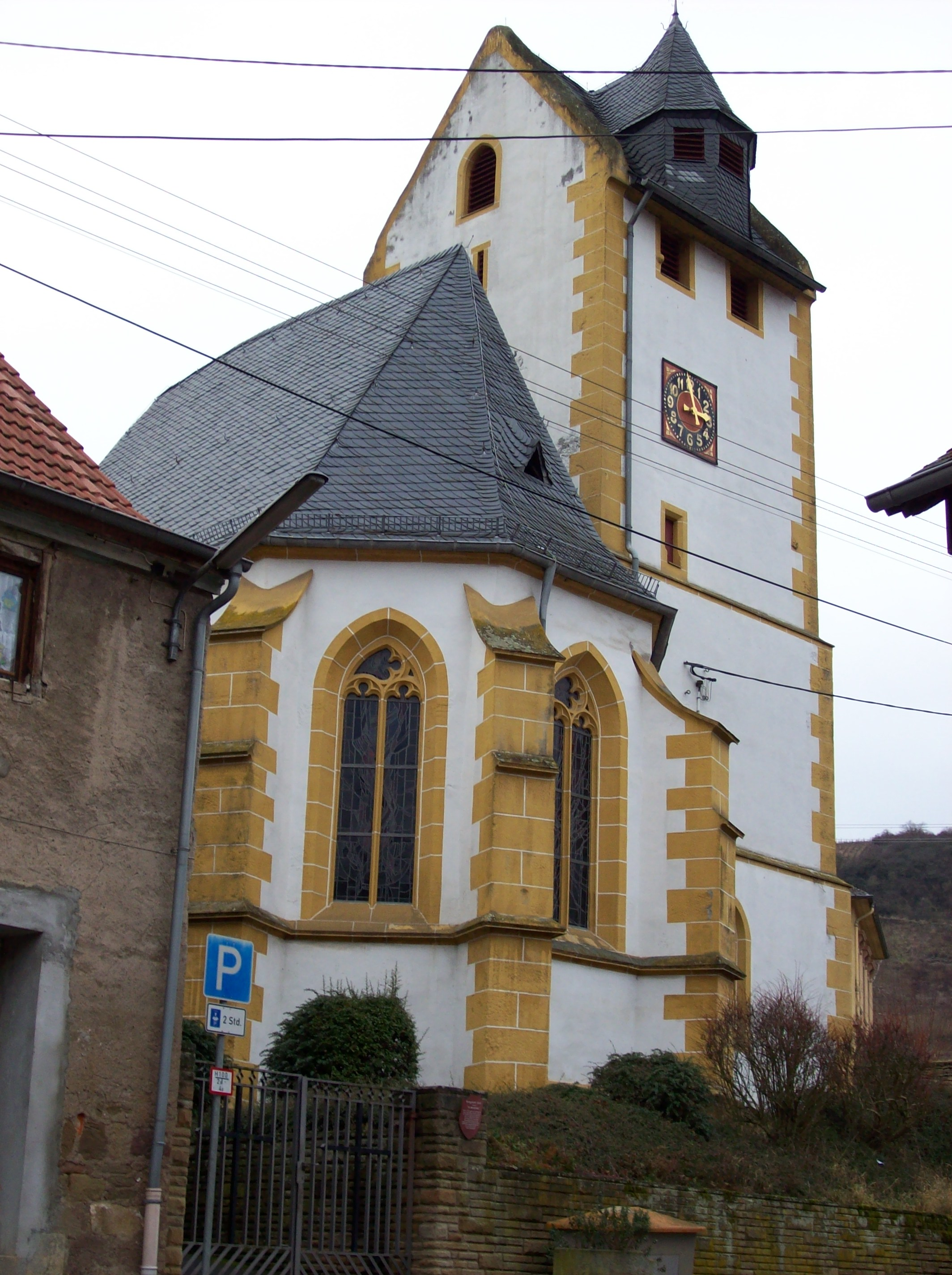 Evangelische Kirche 12. Jahrhundert